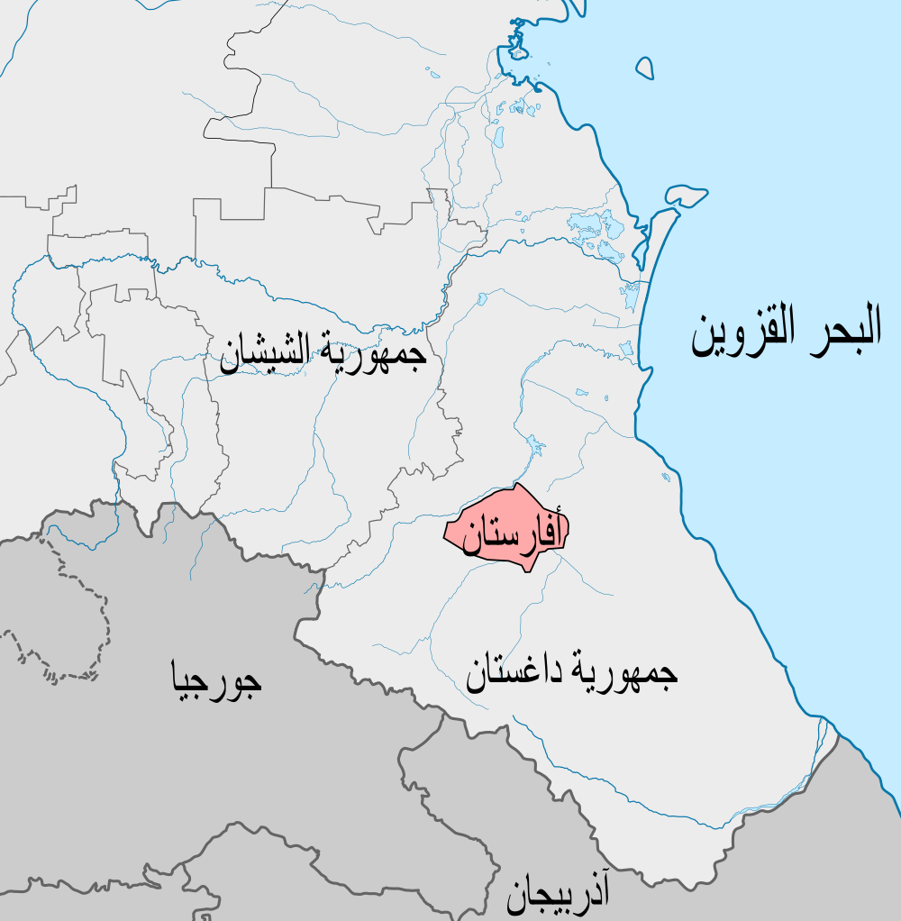 خارطة أفارستان